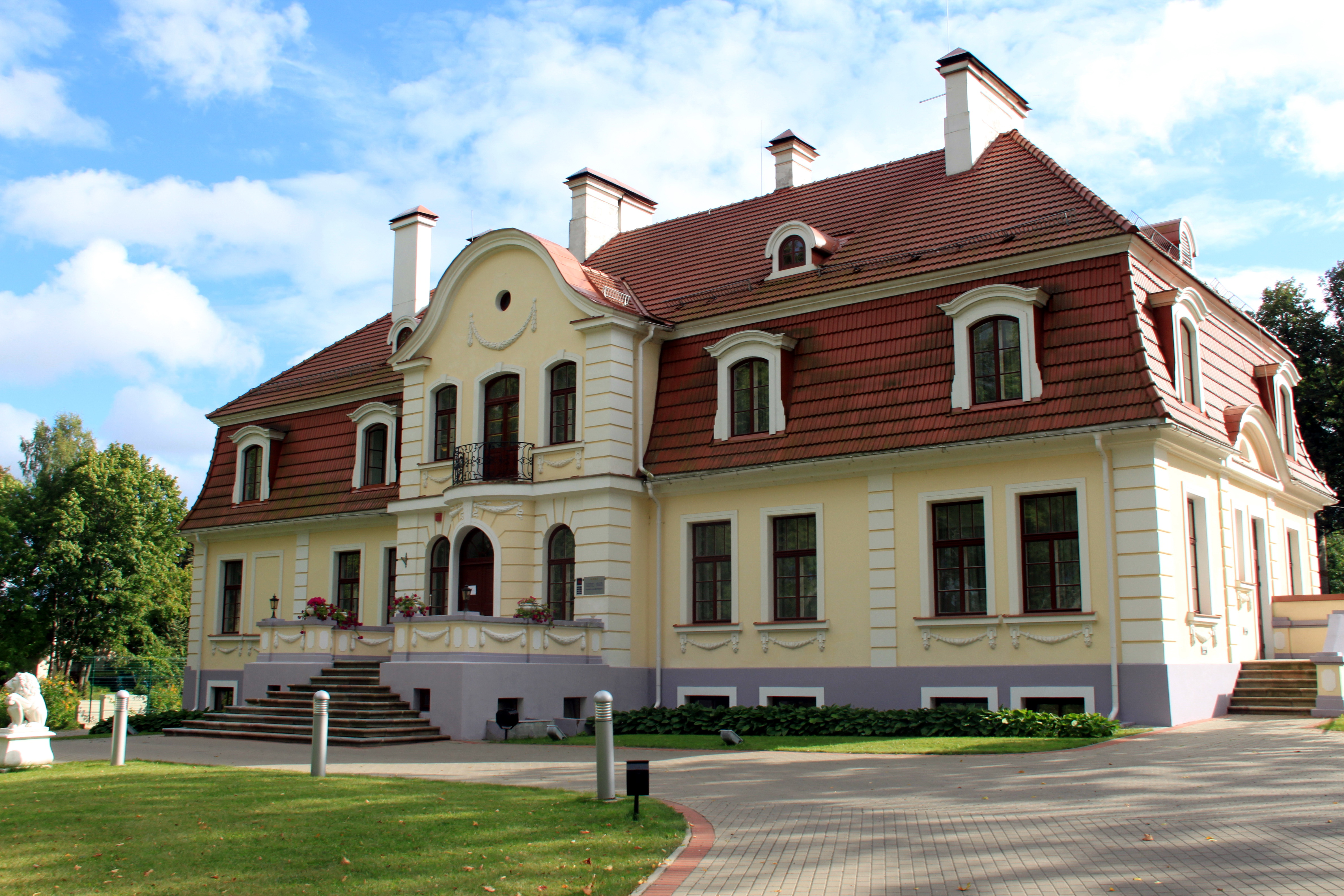 Svente